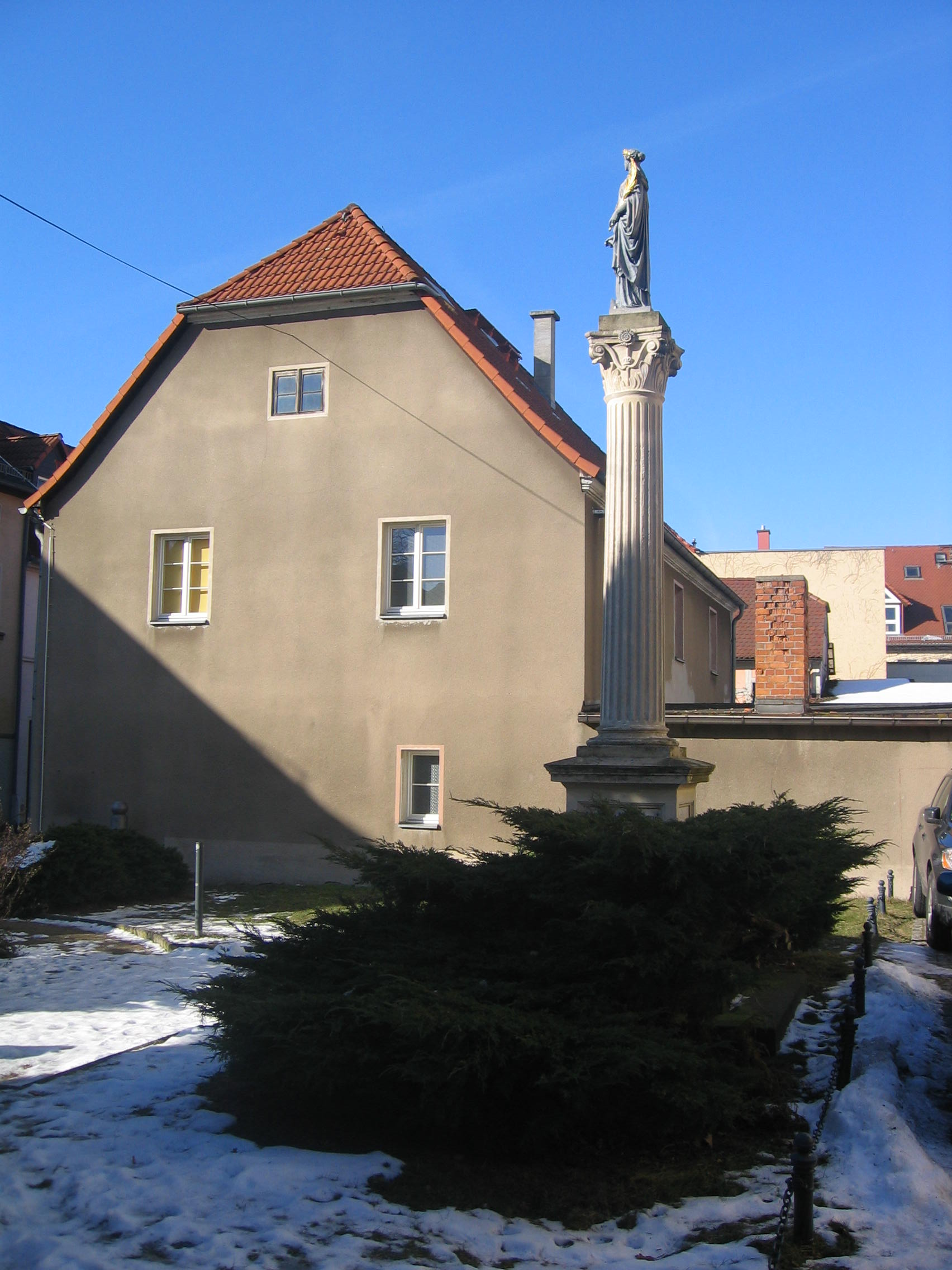 Ruhland, Kirchplatz, Germaniadenkmal, Ostansicht